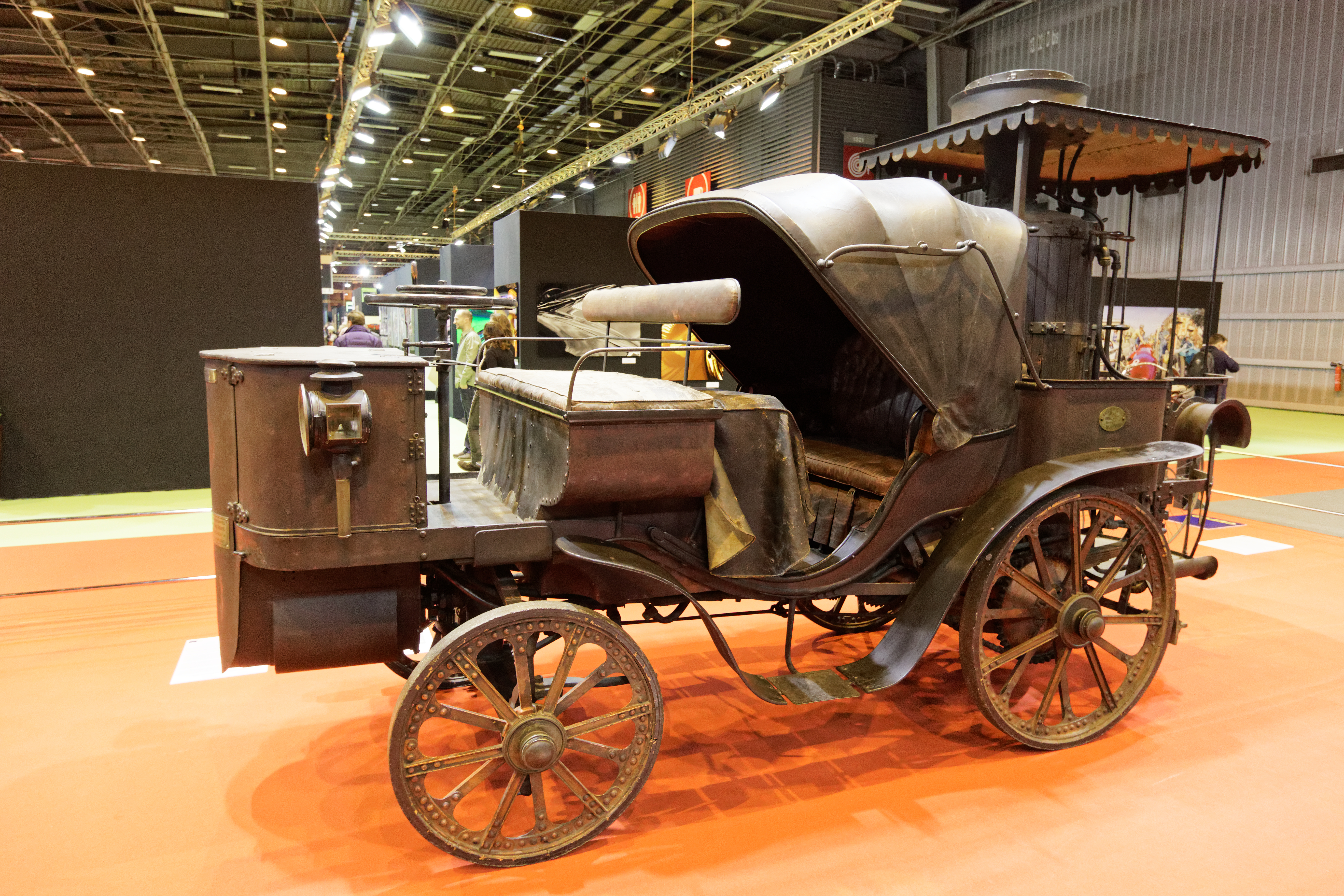 La Mancelle de 1878 par Amédée Bollée père exposée lors du salon Rétromobile 2016.